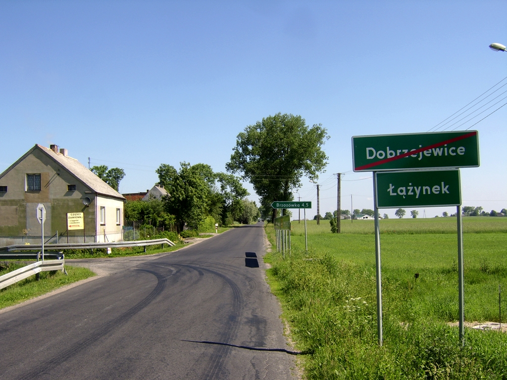 Wieś Łążynek